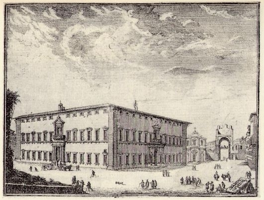 Incisione di epoca barocca in cui si vede l'Ospedale Maggiore di Messina, opera di Andrea Calamech.